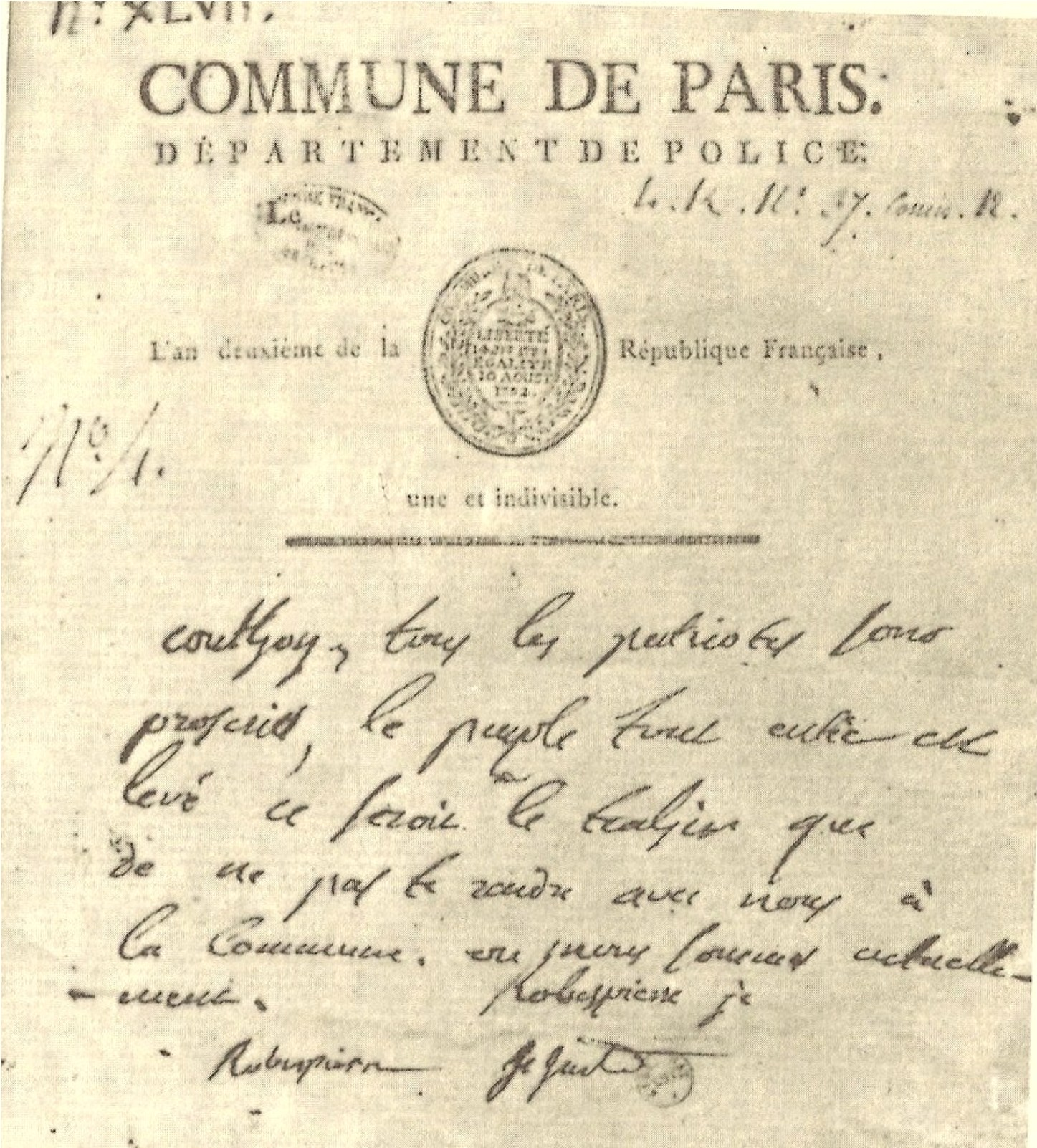 Proclamation de la Commune de Paris en date du 10 Thermidor An II. Lettre écrite par Augustin Robespierre et signée par lui, de son frère Maximilien et Saint-Just à l'intention de Couthon encore emprisonné : « Couthon, tous les patriotes sont proscrits, le peuple tout entier est levé, ce serait le trahir que de ne pas te rendre avec nous à la Commune, où nous sommes actuellement. »